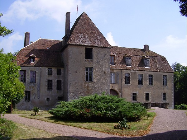 Château de Lantilly, Cervon, Nièvre